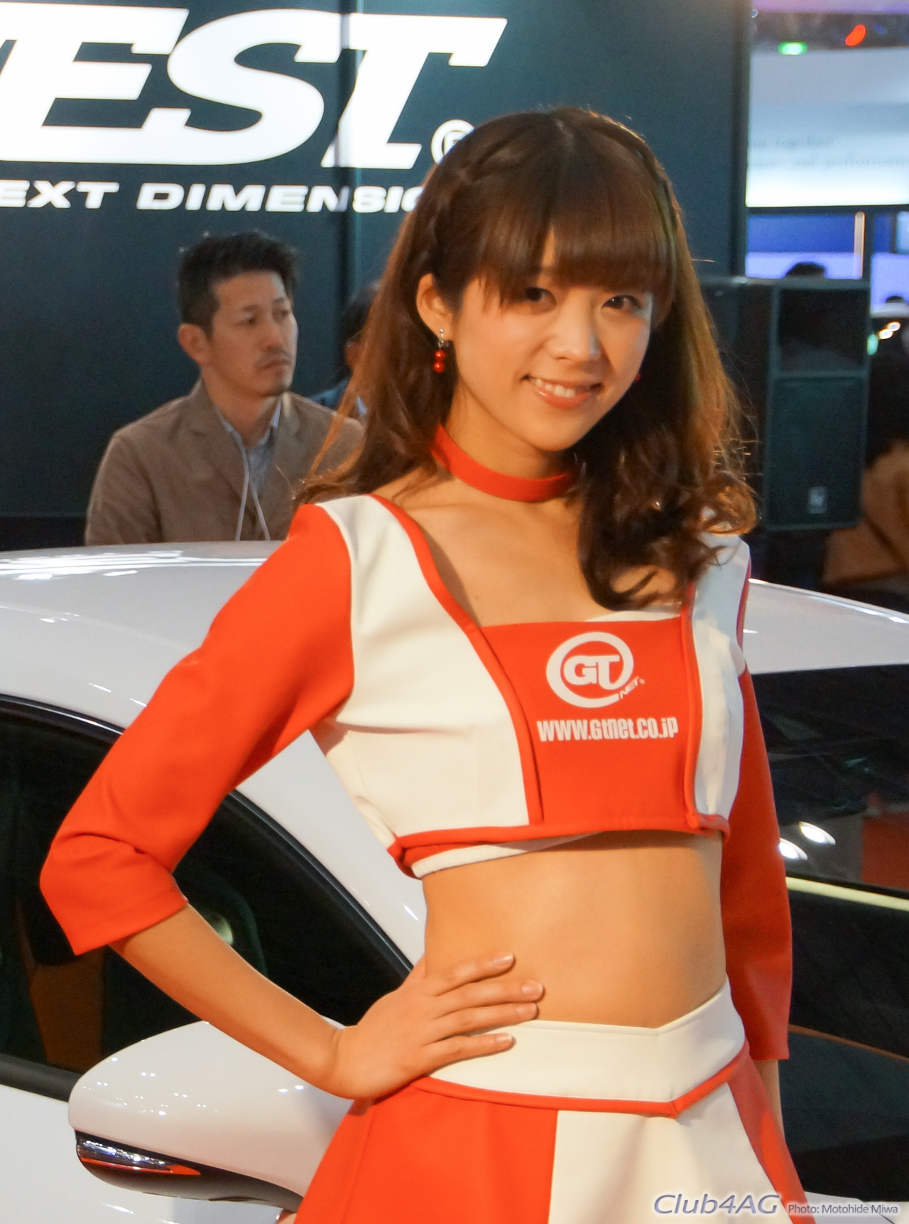 Tokyo Auto Salon 2016